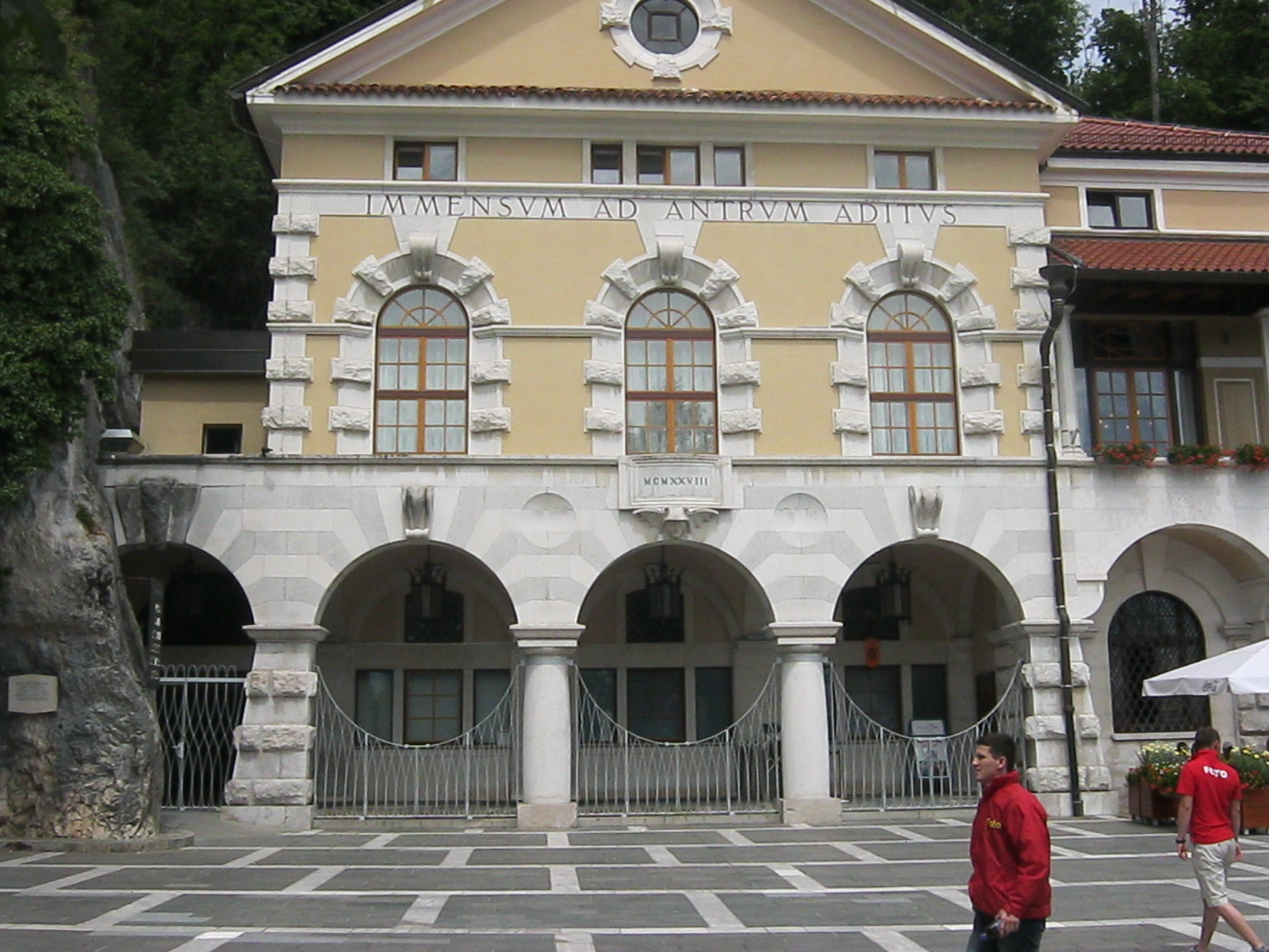 Das Eingangsgebäude an der Grotte von Postojna